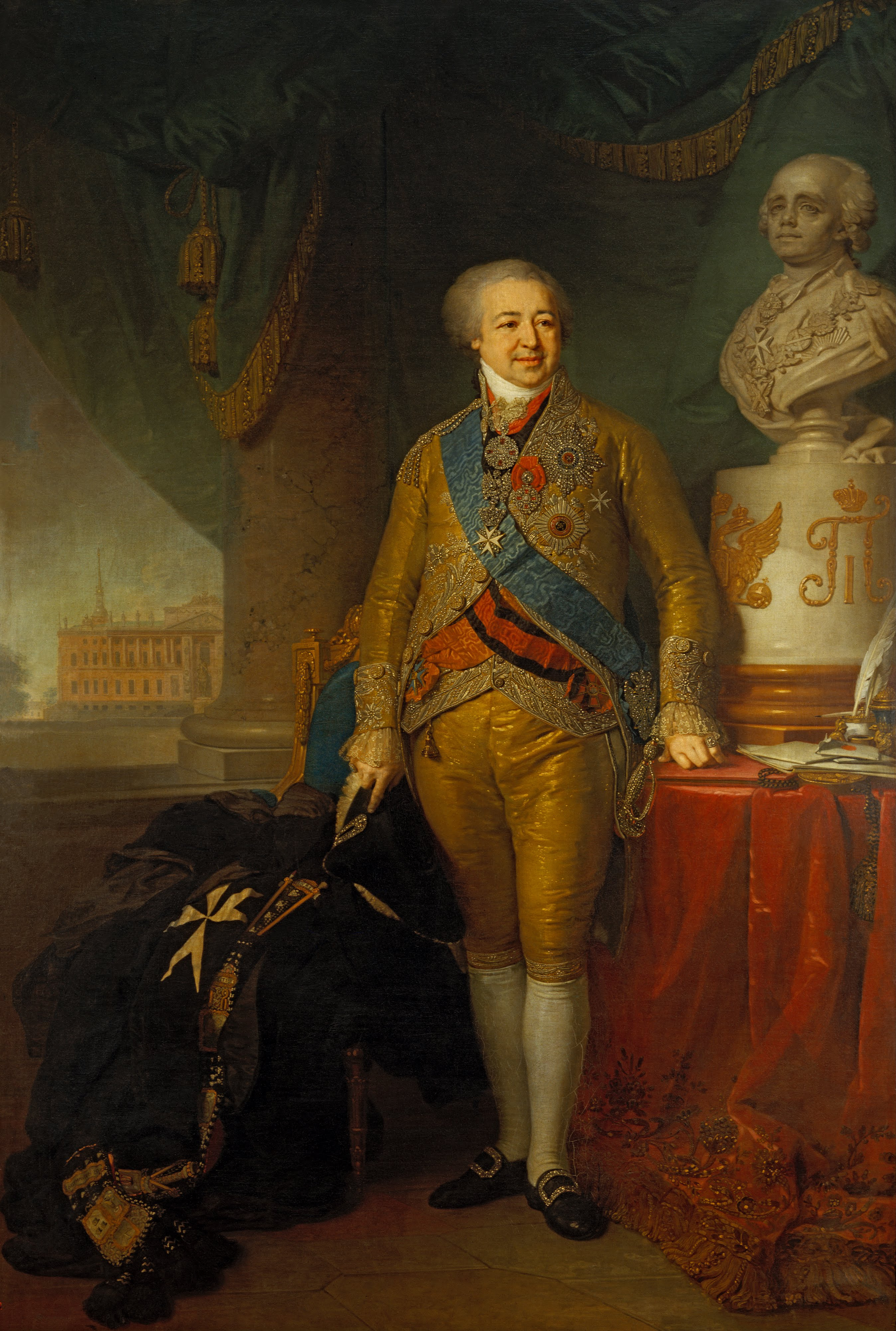 Князь Александр Борисович Куракин (1752-1818)